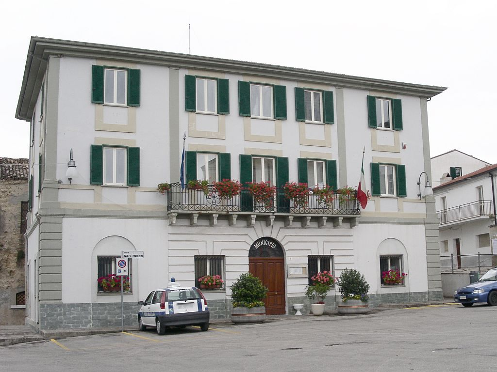 Il Municipio di Mozzagrogna. Mozzagrogna (CH), 3 giugno 2007. Foto scattata da me.